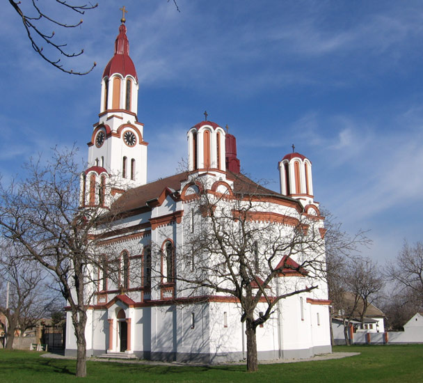 Serbian Orthodox Church of Starčevo, near Pančevo, Vojvodina (Serbia)/L'église orthodoxe serbe de Starčevo, près de Pančevo, Voïvodine (Serbie)